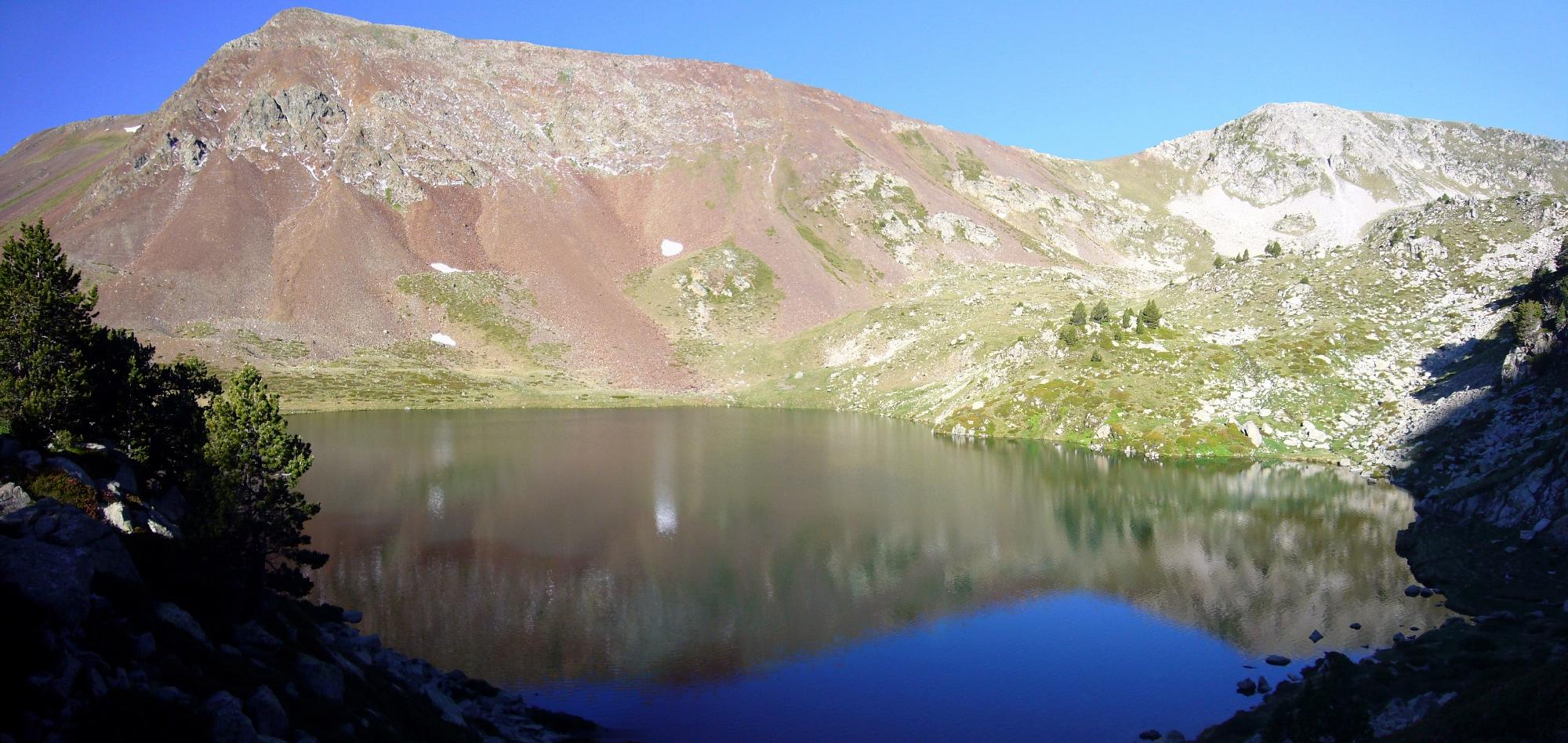 Estany Roi i Pic d'Estany Roi vistos des de la riba nord-oriental; la Vall de Boí, Alta Ribagorça, Catalunya